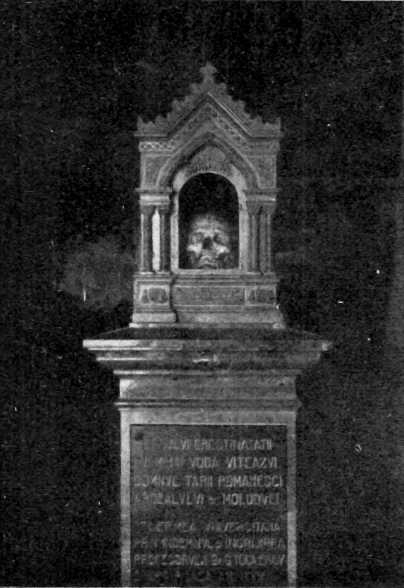 Capul lui Mihai Viteazul de la Manastirea Dealu de la Targoviste